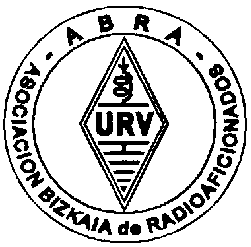 Logotipo de Union de Radioaficionados de Vizcaya